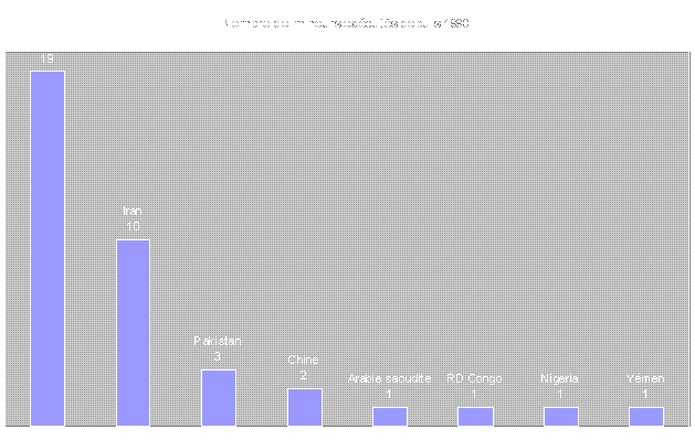 Nombre de mineurs exécutés depuis 1990 (Source : Amnesty international). Depuis 2005, les Etats-Unis ne pratiquent plus la peine de mort pour les mineurs.